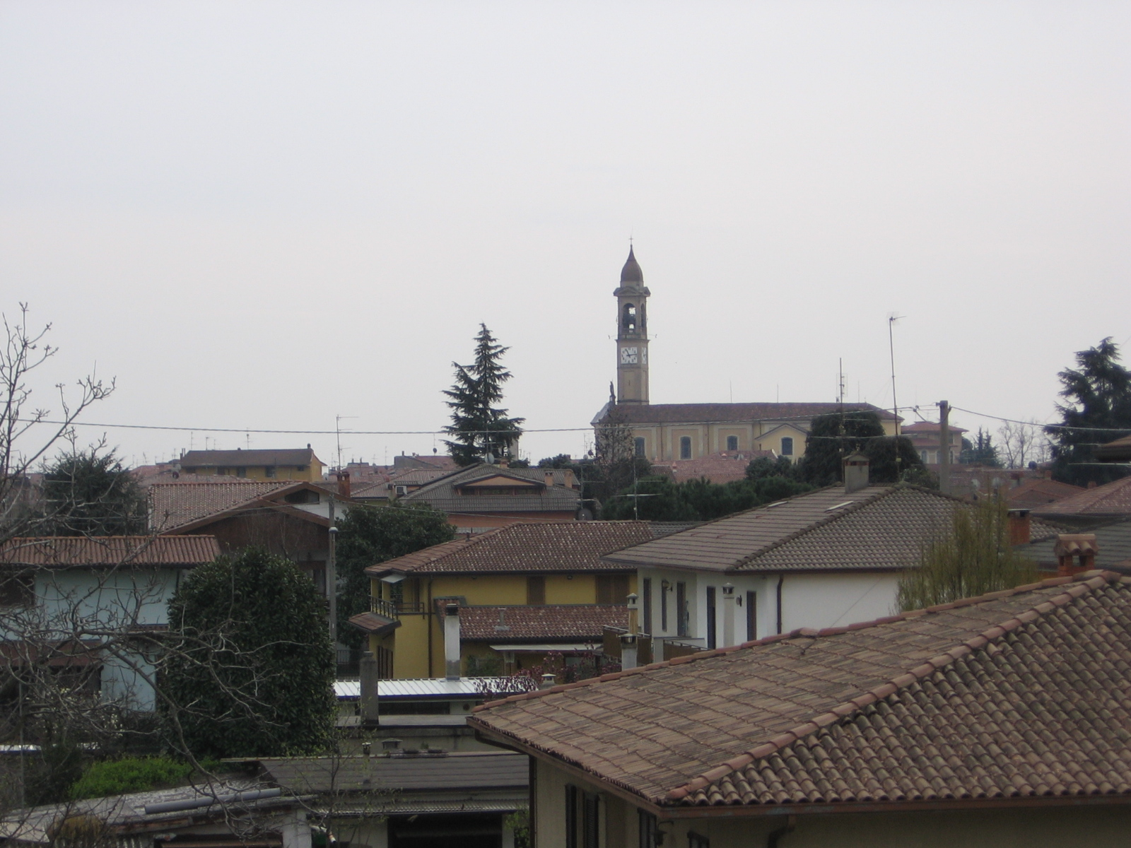 Palosco, Bergamo, Italia